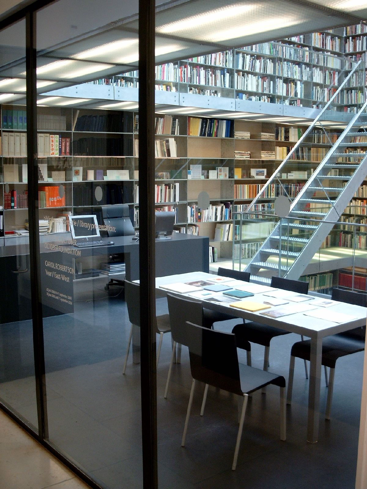 Bibliotheek Van Abbemuseum, Eindhoven, ontwerp Maarten Van Severen